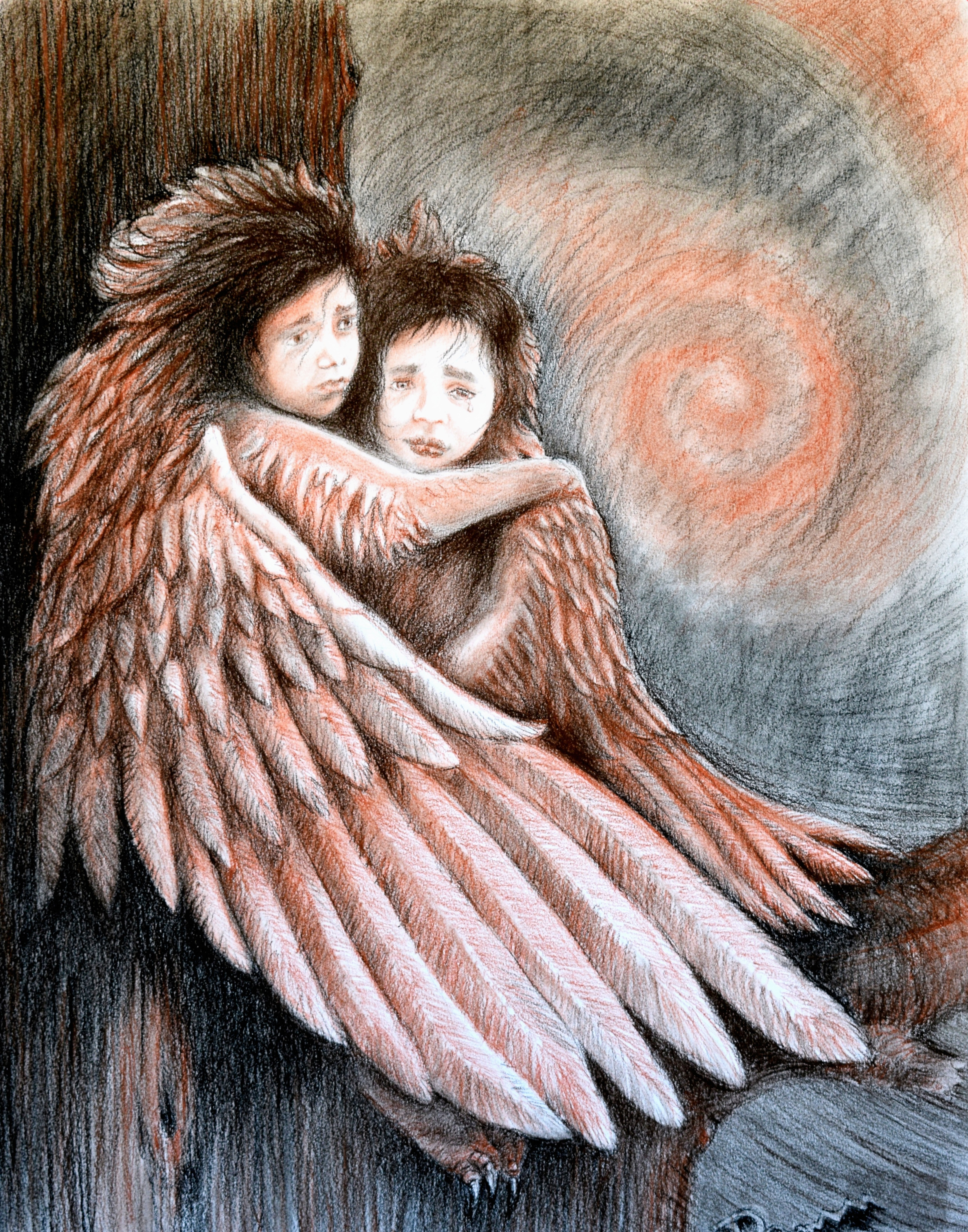 Dos niños abandonados en la amazonáa son trasnformados por la madre naturaleza en aves para volver a su hogar...